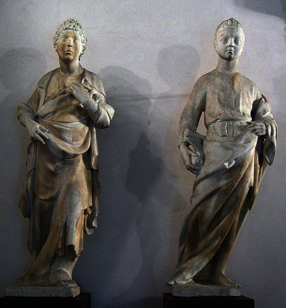 Donatello e nanni di banco, profetini dalla porta della mandorla new